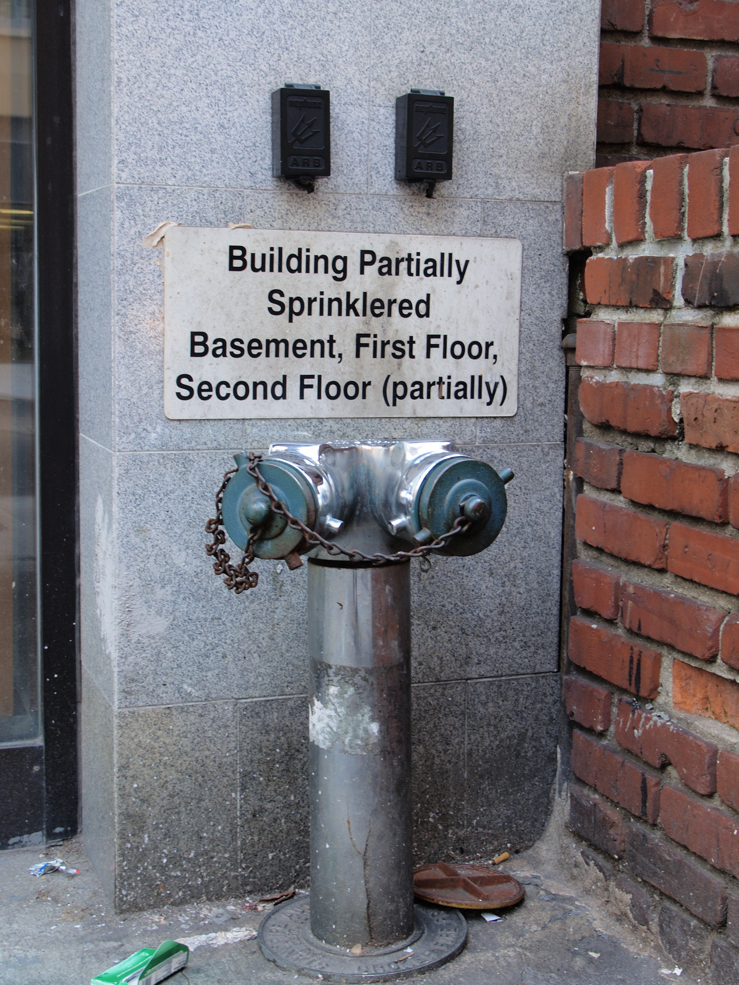 Anschluss für einen Feuerwehrschlauch, gesehen in Manhattan, New York